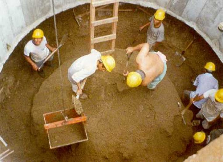 Hundimiento de un Caisson escavando a mano en el interior Trabajo de hundimiento del "Caisson" de cimentación del nuevo Puente Bolognesi, Proyectista del Puente: C.Lotti & Associati - Roma Director de Proyecto: Ing. Alfredo Bianco Calculista responsable: Ing. Doumitrescu Autor: Alfredobi Lugar: Piura, Perú. Fecha: Aproximada 2001